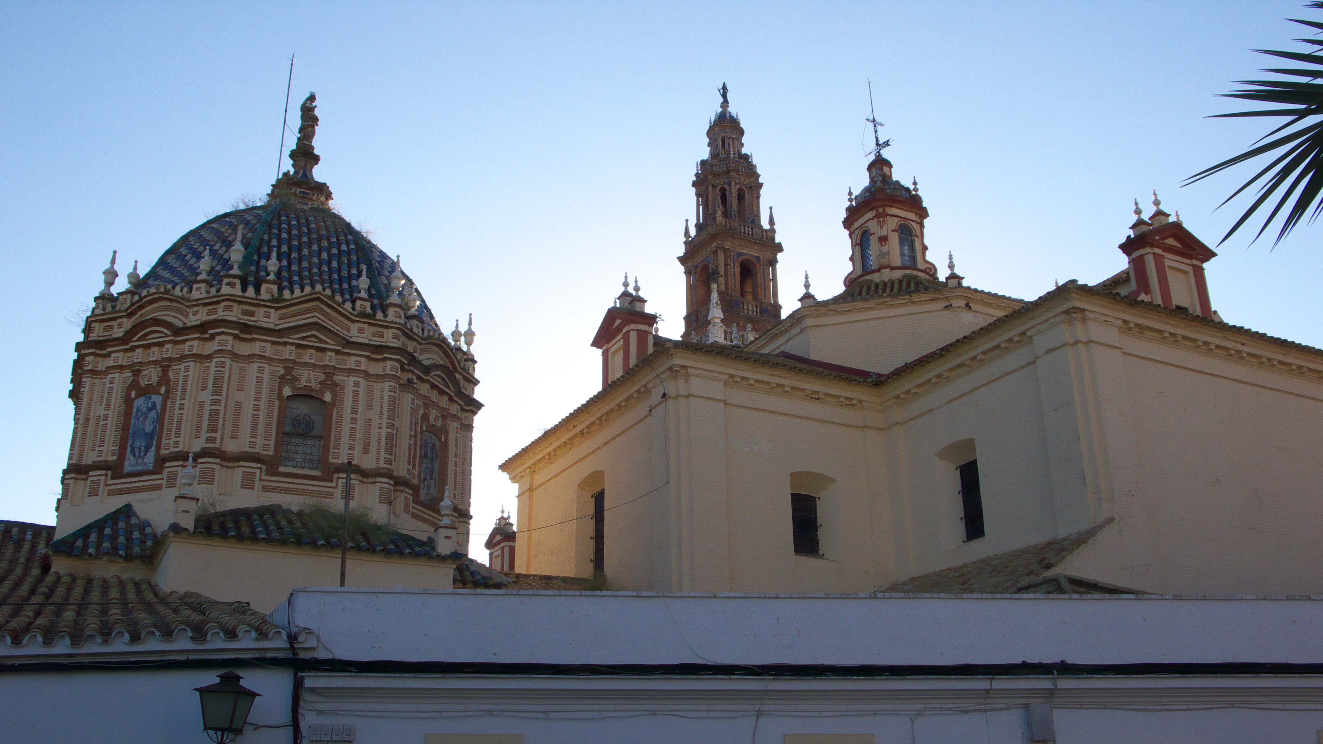 Arquitectura barroca en Carmona, provincia de Sevilla. AMBROSIO DE FIGUEROA